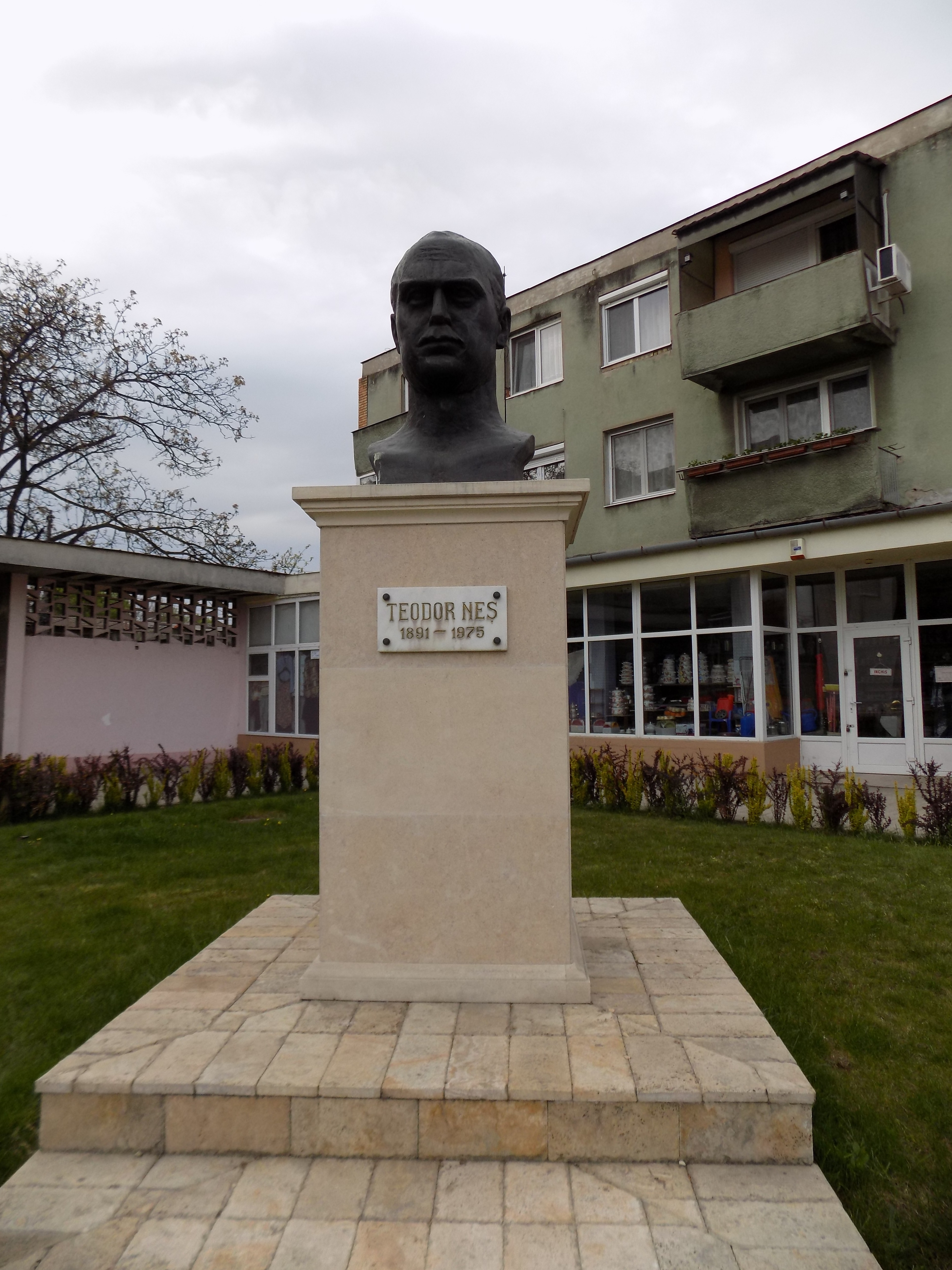 Salonta